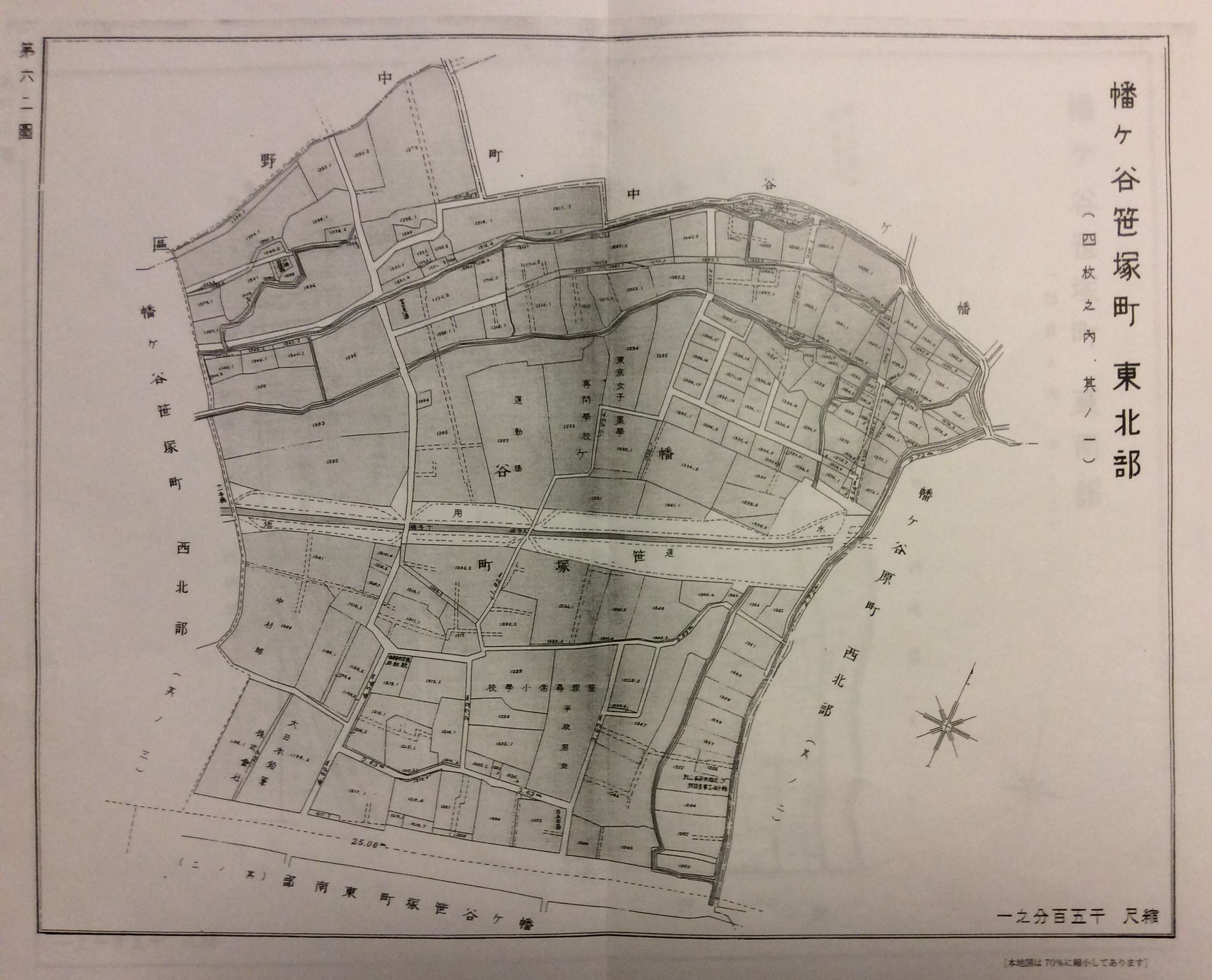 （2014年12月25日撮影）